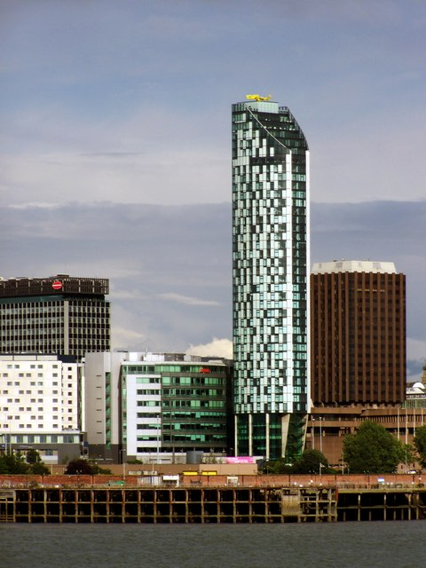 West Tower, Brook Street, Liverpool